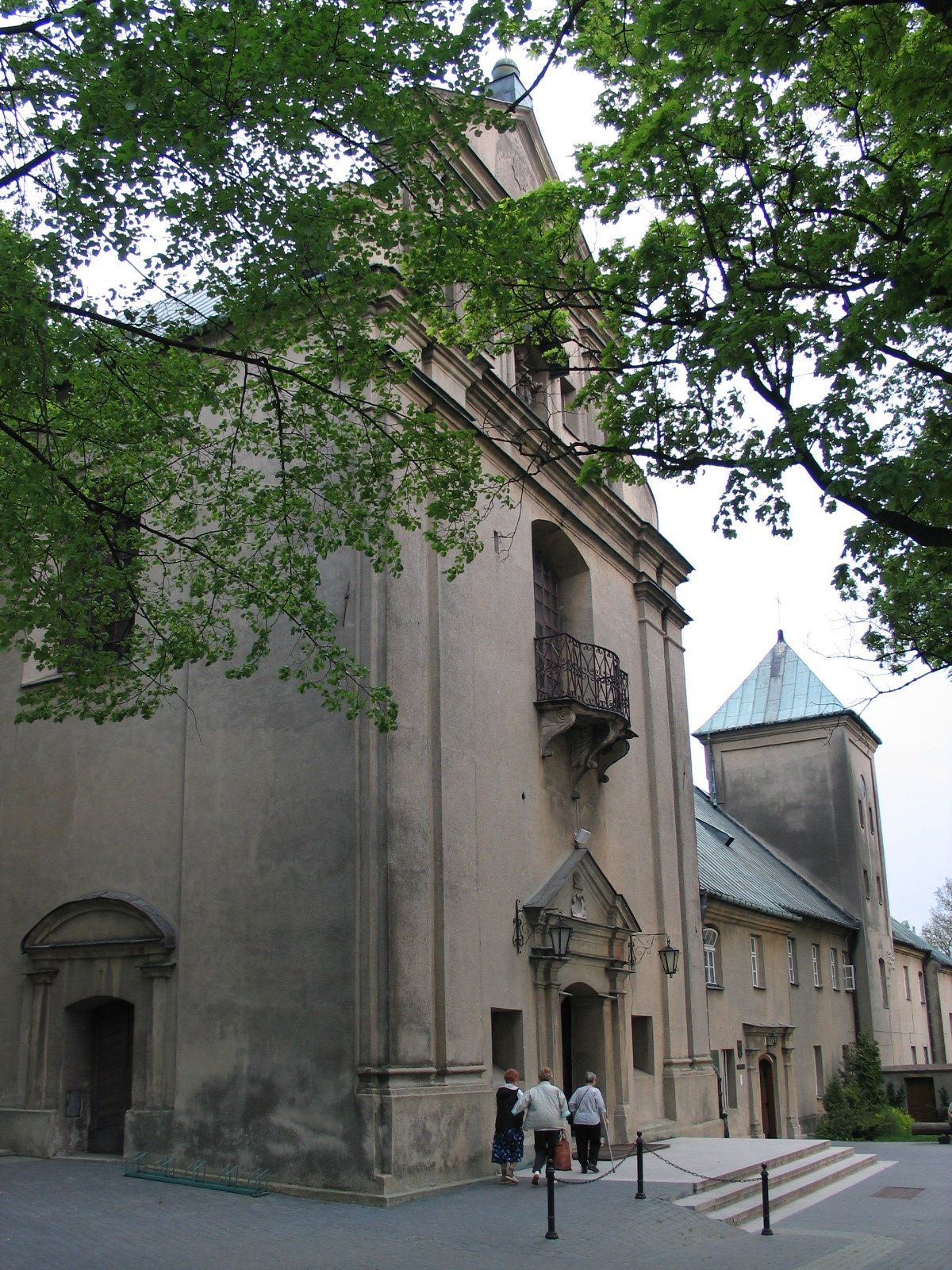 Kościół św. Antoniego w Łodzi